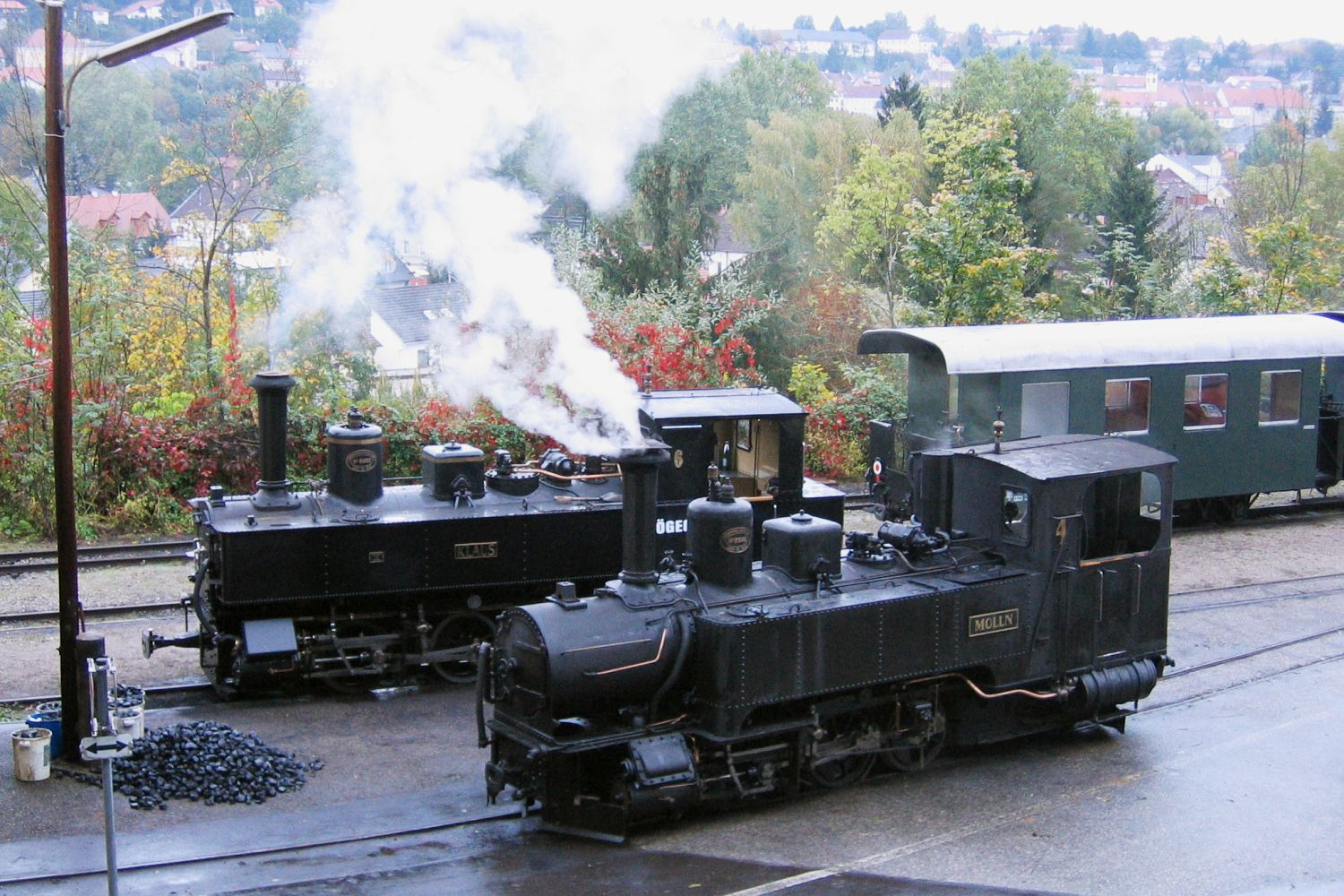 Zum Jubiläum "20 Jahre Steyrtal-Museumsbahn" konnten alle erhalten gebliebenen Originallokomotiven betriebsfähig präsentiert werden. Hier die Loks 4 und 6 in Steyr-Lokalbahnhof